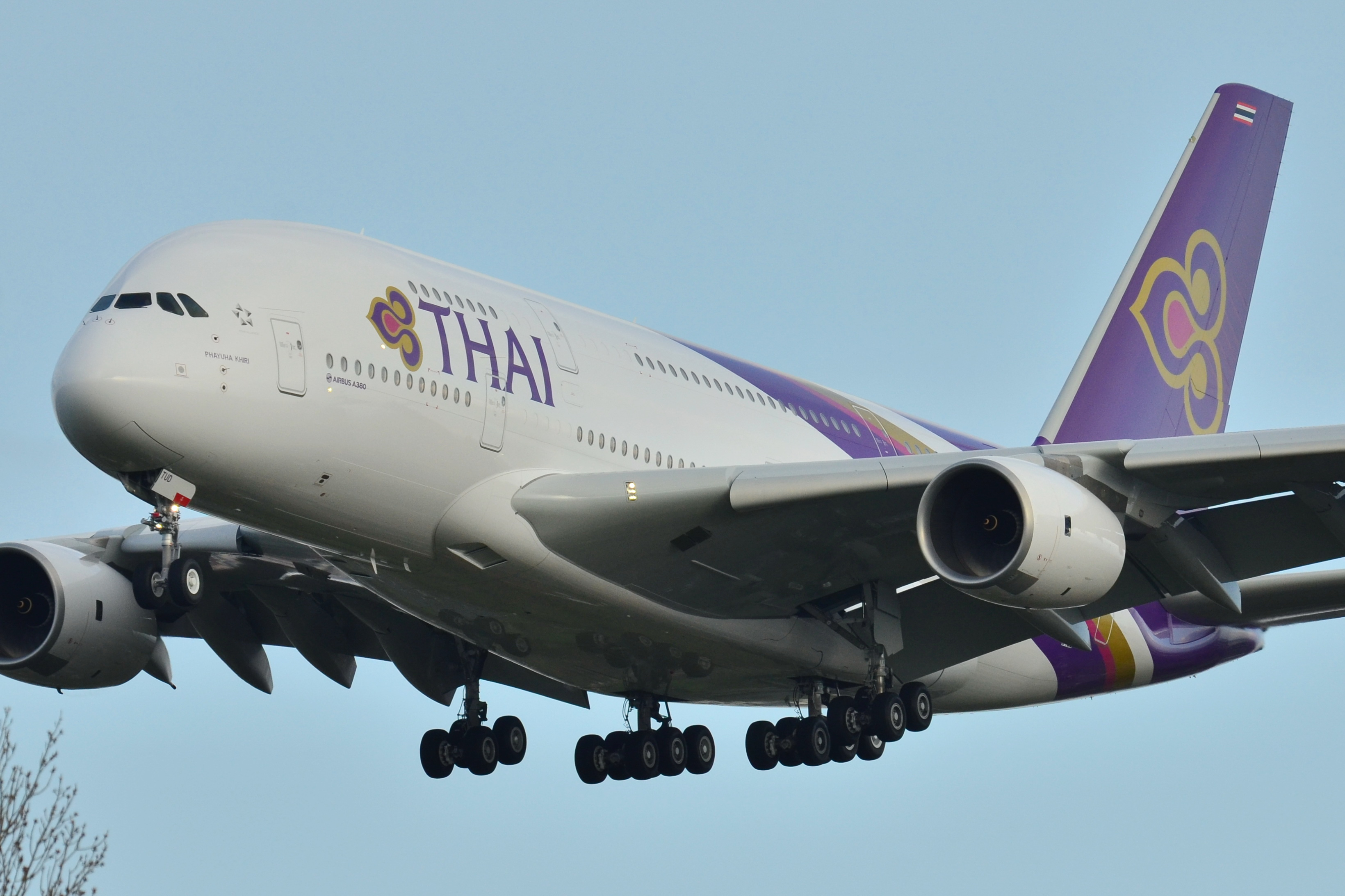 Photo prise à l'aéroport de Toulouse-Blagnac (LFBO) en France. Picture take at Toulouse-Blagnac Airport (LFBO) in France.